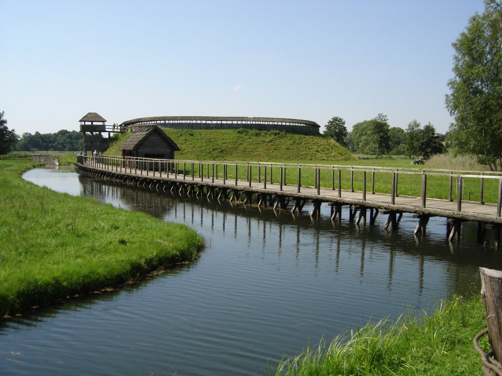 Archäologisches Freilichtmuseum Groß Raden, rekonstruierte Hauptburg mit Zugangsbrücke